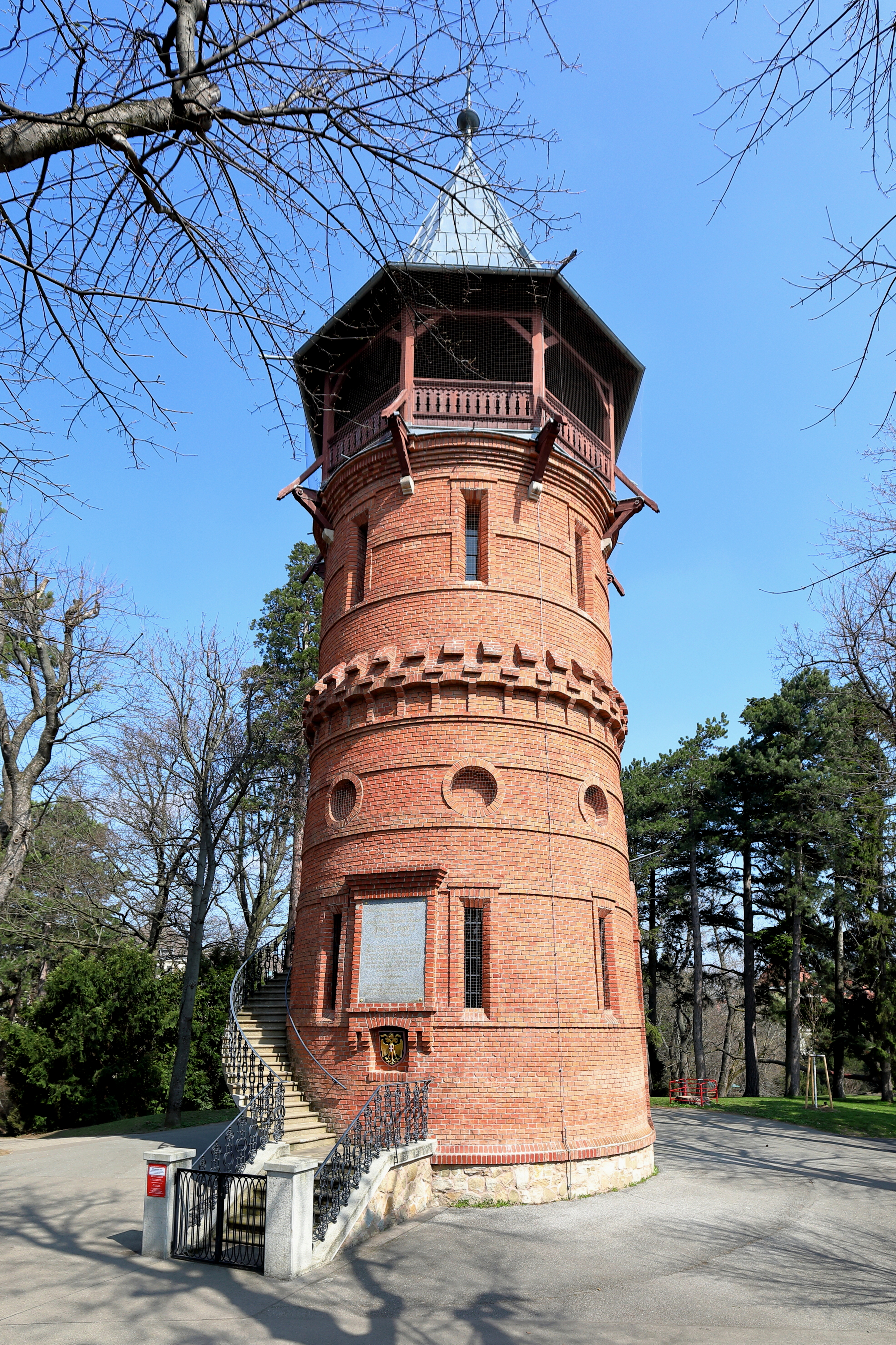 Die Paulinenwarte im Zentrum des Türkenschanzparkes im 18. Wiener Gemeindebezirk Währing Der Türkenschanzpark war ursprünglich eine Schottergrube. Nach einer Idee von Heinrich von Ferstel wurde diese zu einem Volkspark im englischen Landschaftsstil umgestaltet und am 30. September 1888 vom Kaiser eröffnet. Im Zentrum errichtete man einen 23 Meter hohen Aussichtsturm, der zugleich ein kleiner Wasserspeicher war. Nach der Eingemeindung 1892 widmete 1908 die Stadt Wien Grundstücke zu einer Erweiterung des Parks. Im Zuge der Erweiterung spendete die Fürstin Pauline Metternich viele exotische Pflanzen und als Zeichen des Dankes erhielt die Aussichtswarte im Jahr 1909 den Namen „Paulinenwarte“. Aktuell (2018) wird sie vom Touristenverein „Die Naturfreunde" betreut und ist fallweise in den Sommermonaten am Wochenende zugänglich.